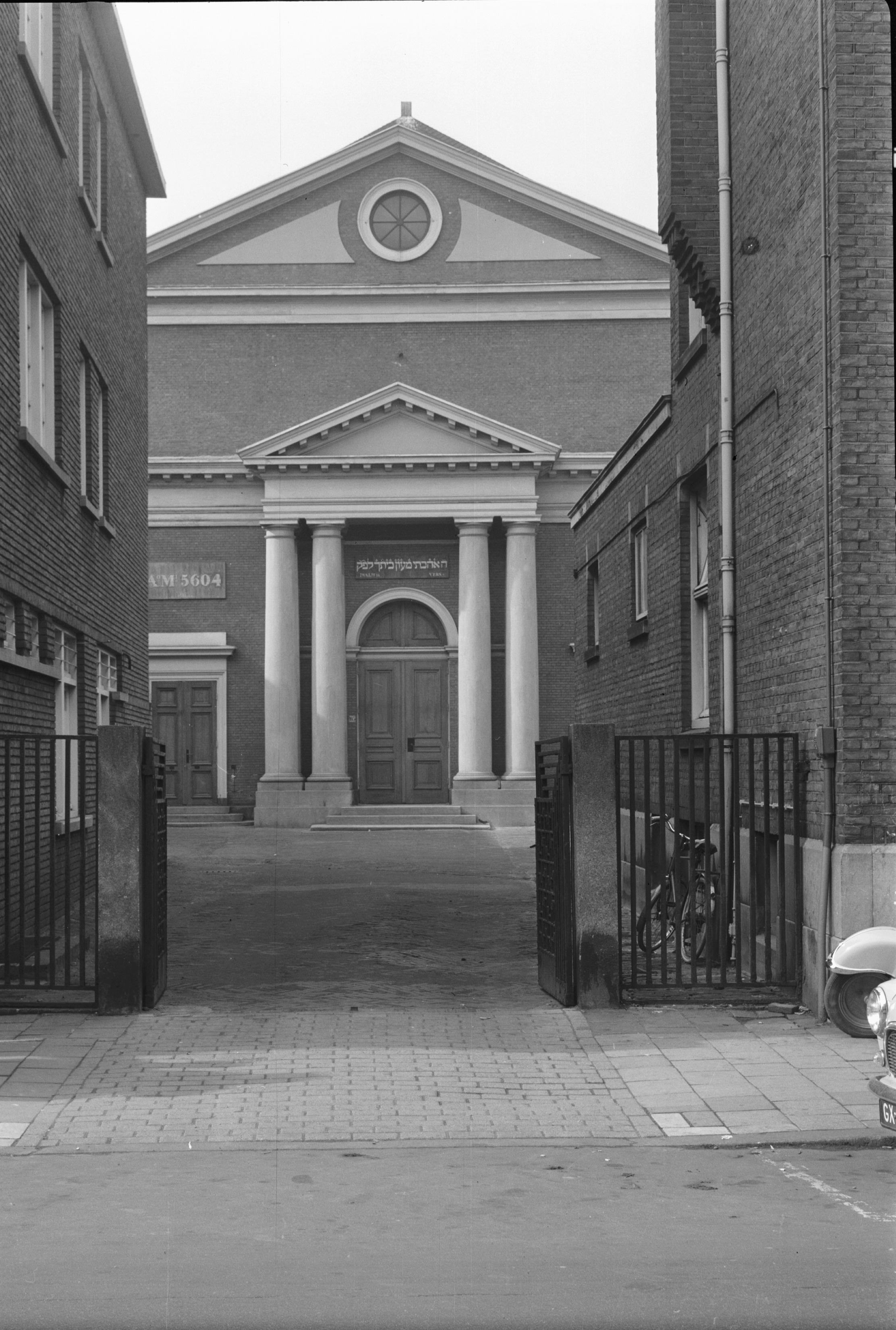 Synagoge: Wagenstr. 103, aanzicht